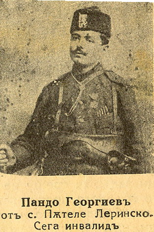 Пандо Георгиев.